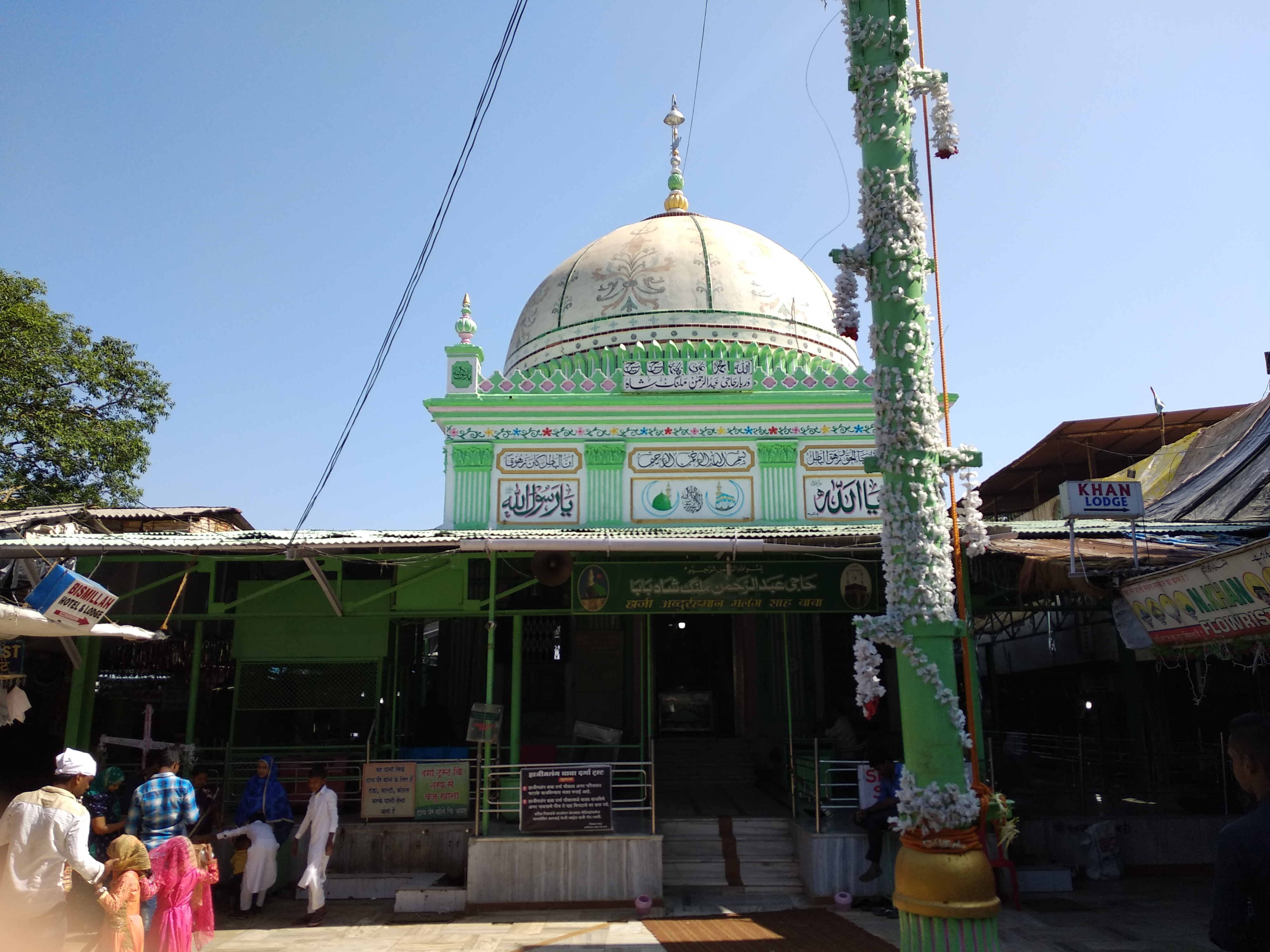 Dargah Sri Haji Malang